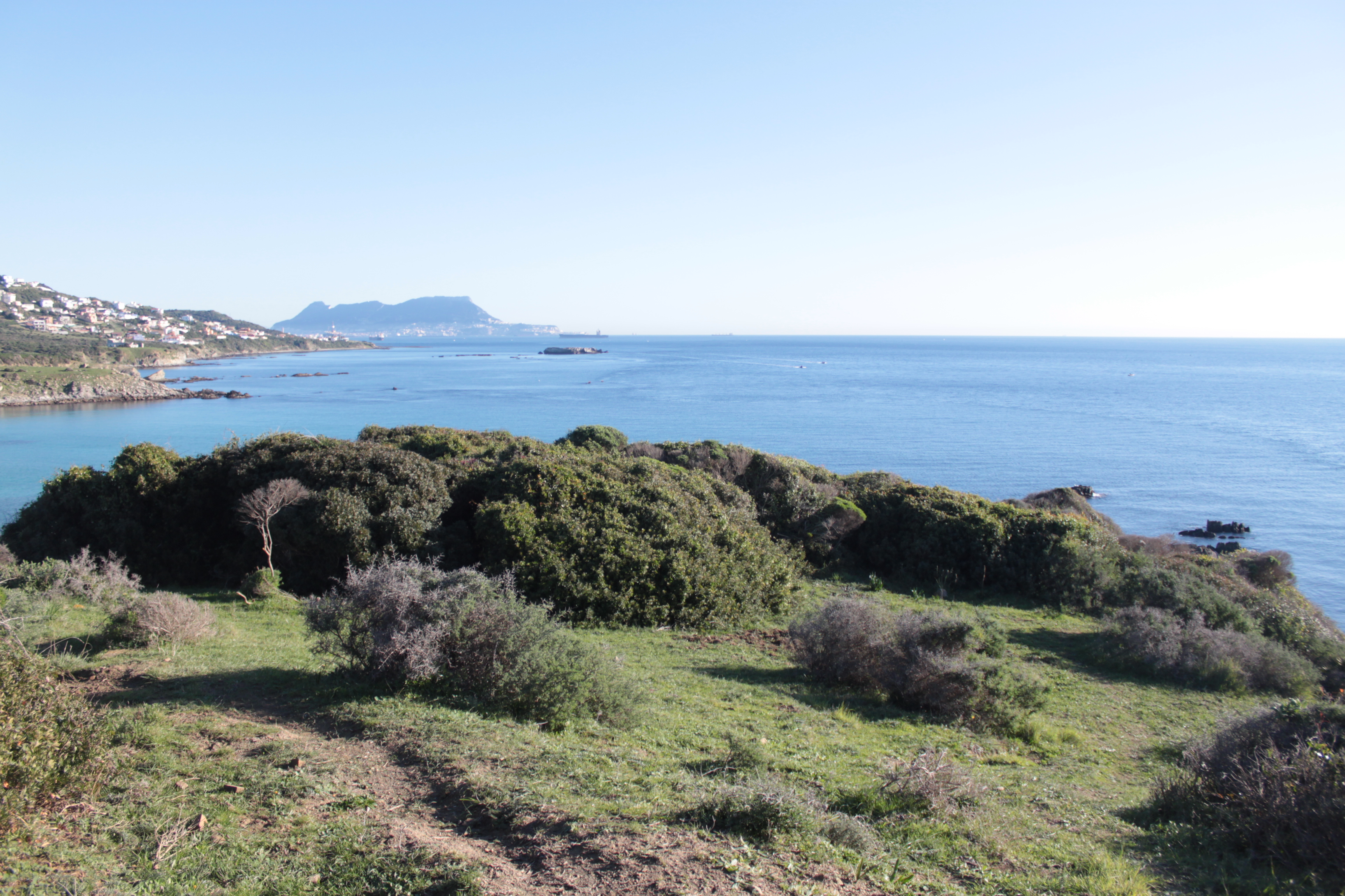 Situación de los escasos restos conservados del Fuerte de San Diego en la Punta del Fraile, Algeciras, Andalucía, España